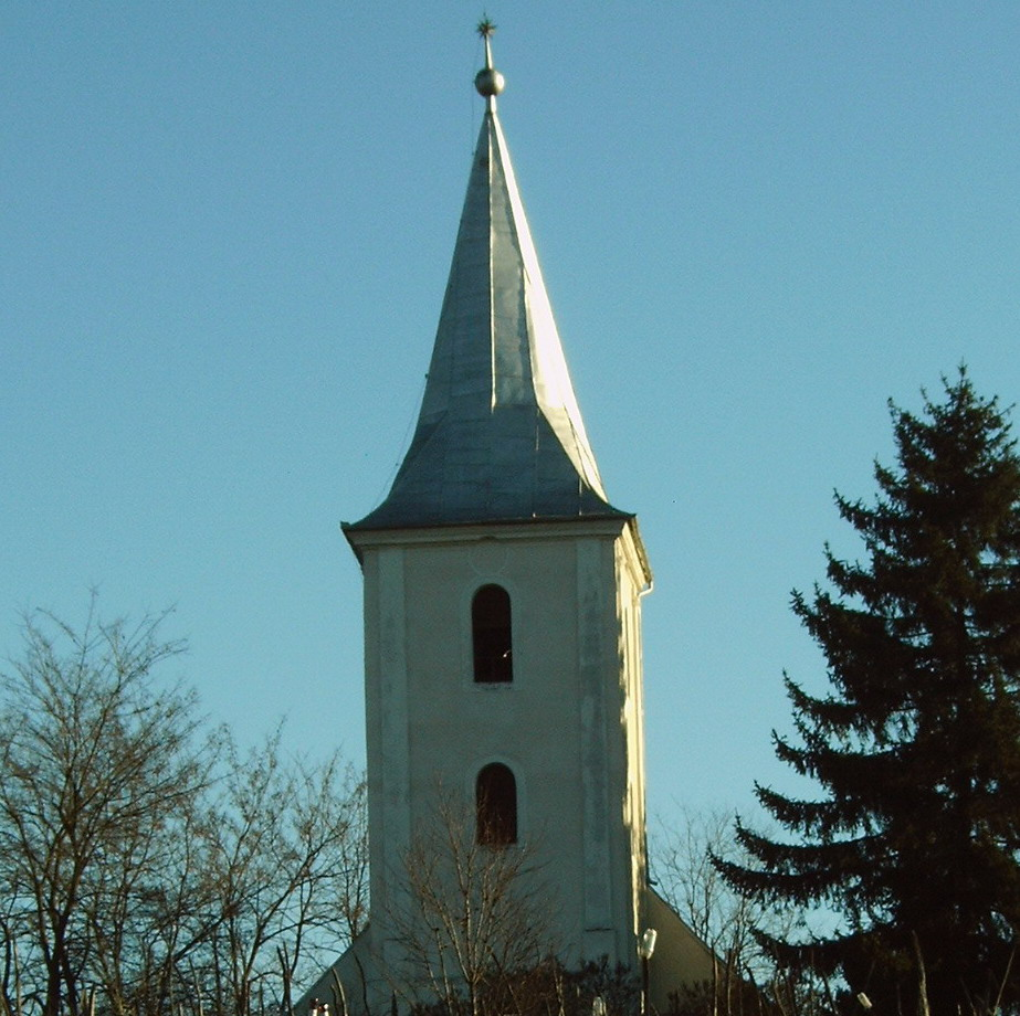 Magyarkirályfalvi református templom tornya, 22 m magas, délnyugati irányban fekszik a királyfalvi Berek tetőn